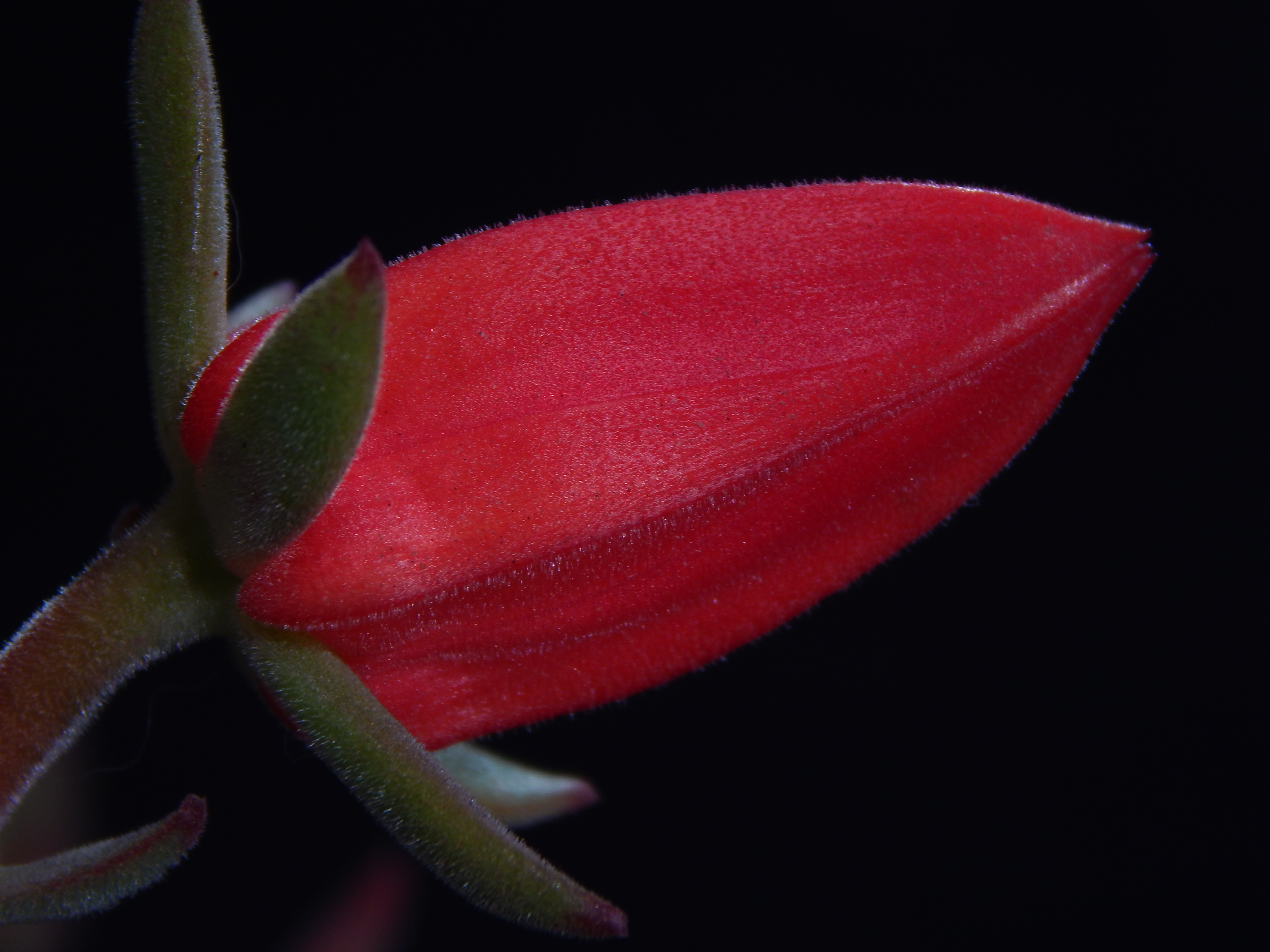 Flor